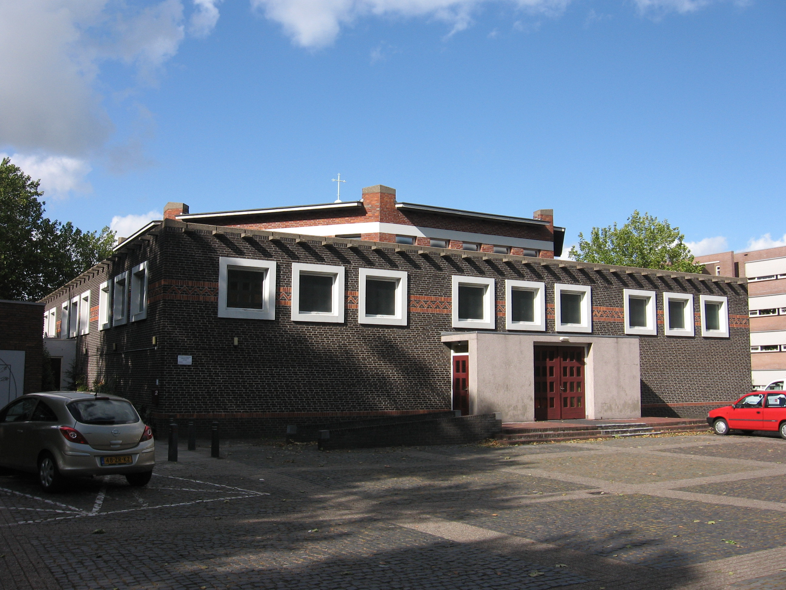 Terneuzen, Emmauskerk